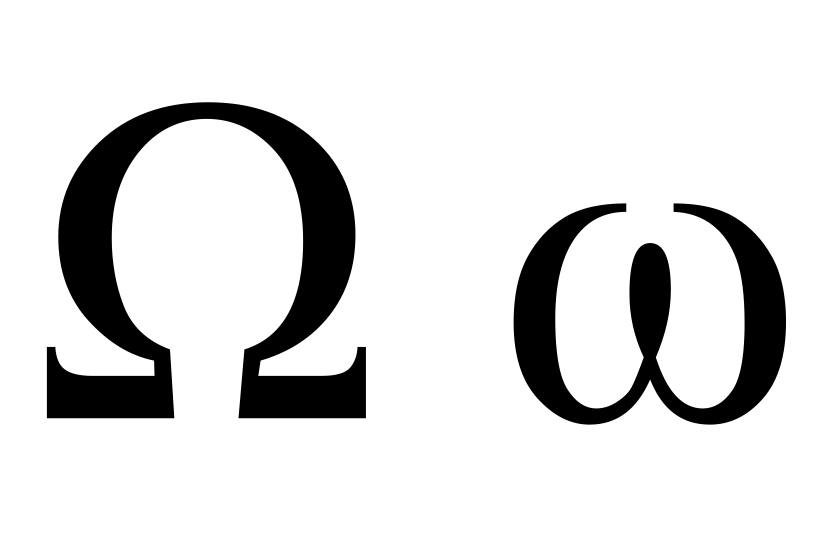 greek letter omega